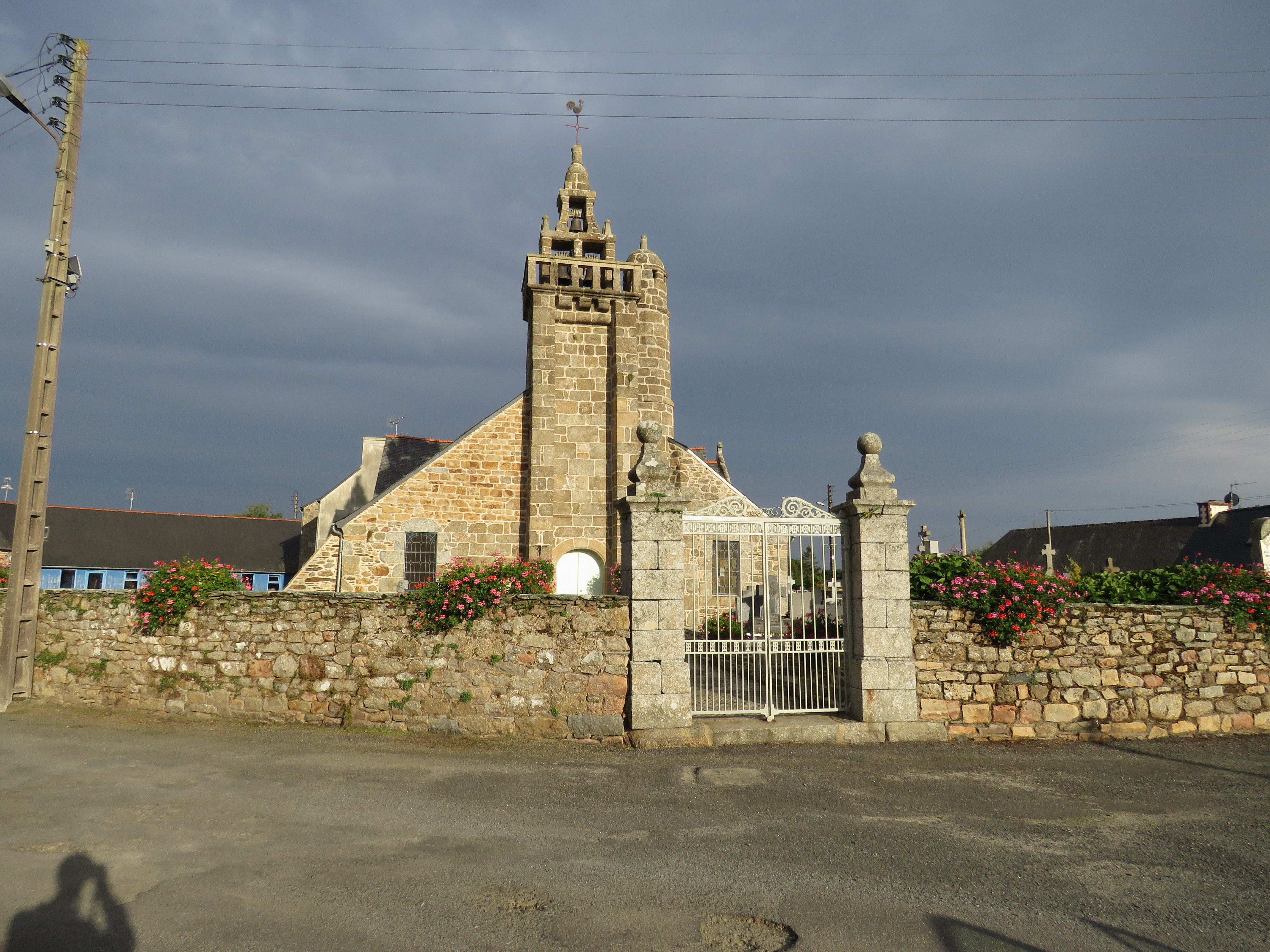 Église Saint-Mérin.